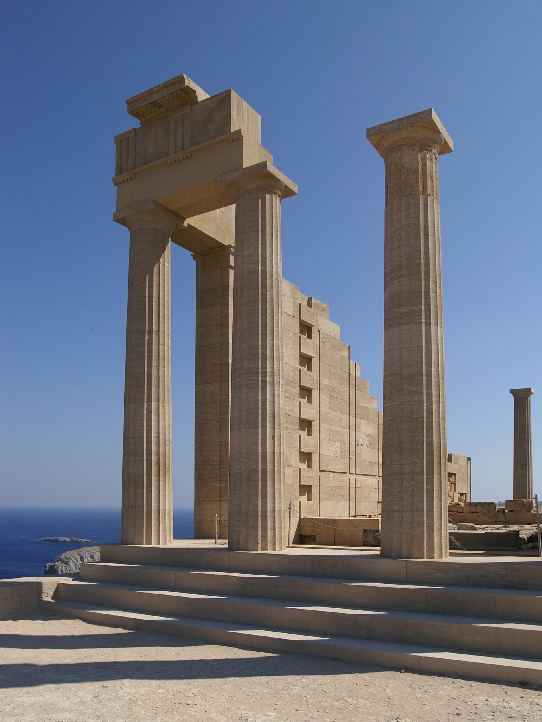 Nachbau der Acropolis auf der Festung von Lindos in Rhodos.